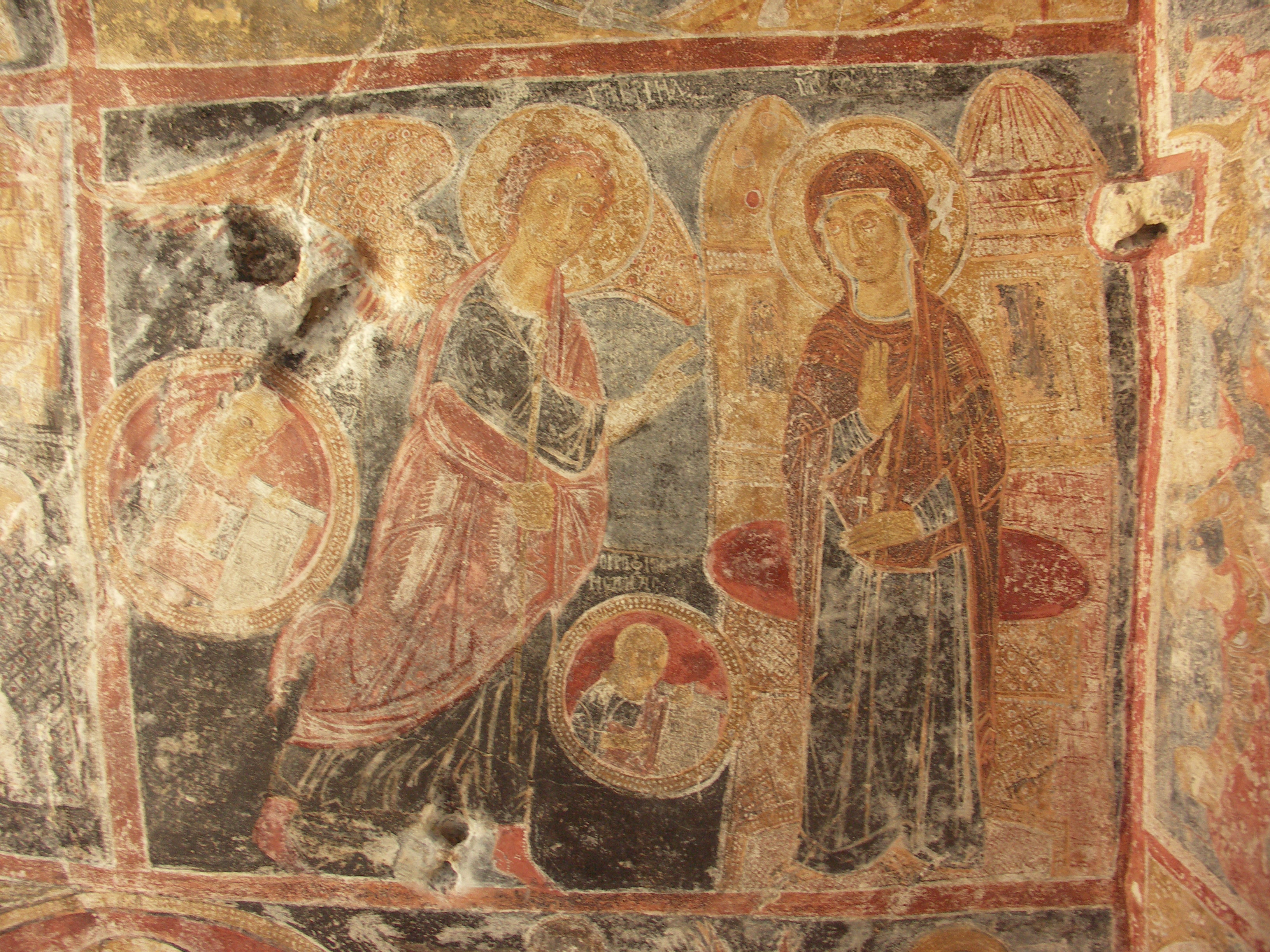 Chiesa rupestre di San Biagio (Brindisi); affresco con l'Annunciazione (anno 1197)